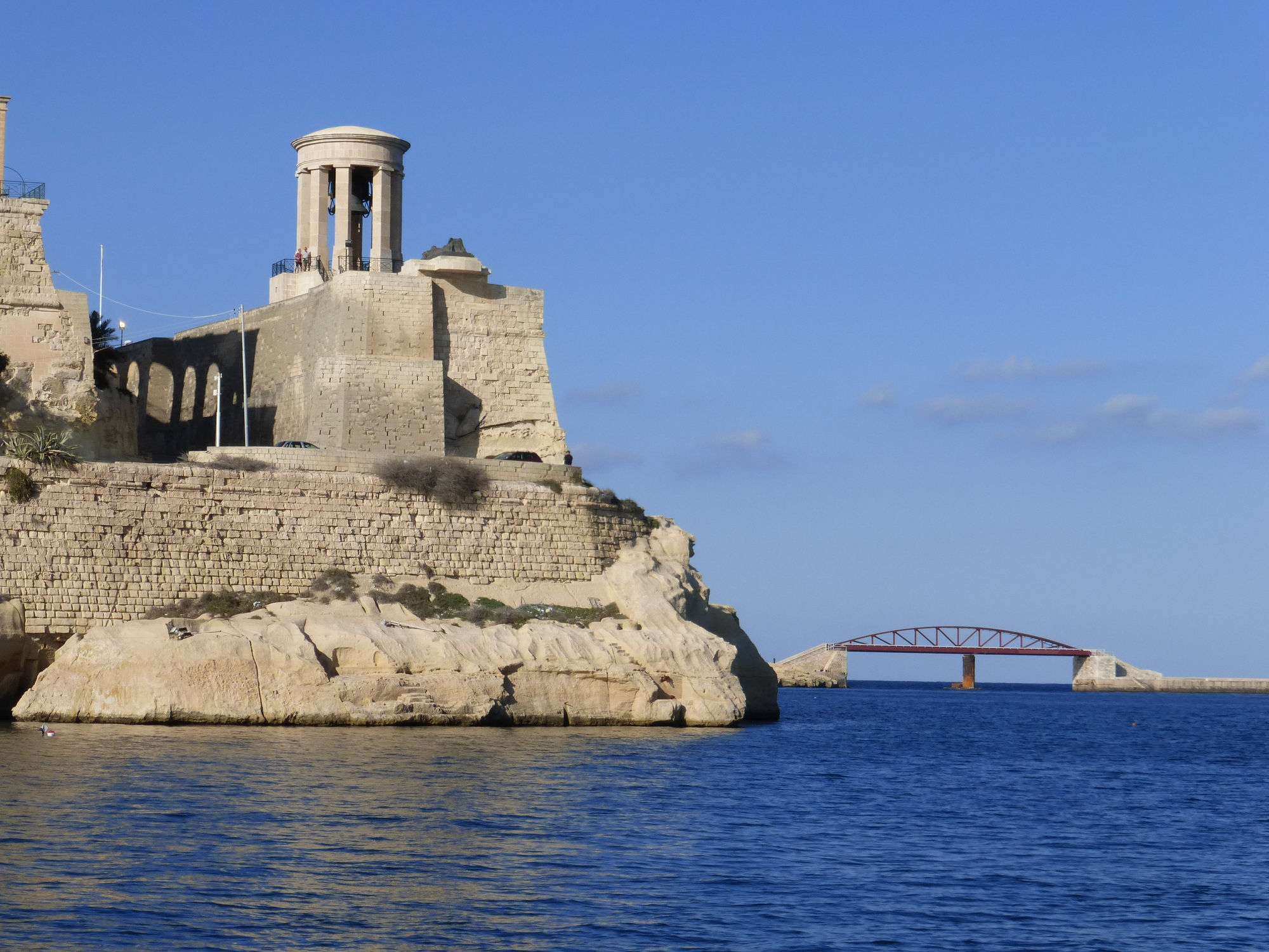 Blick vom Hafen auf das Siege Bell Monument (Valletta, Malta)